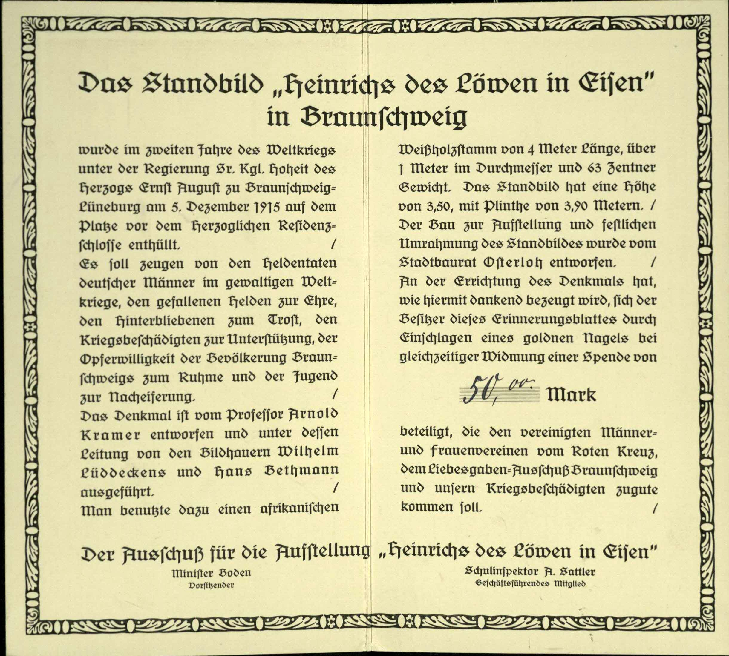 Braunschweig: Innenseiten des Faltblattes für den Eisernen Heinrich.